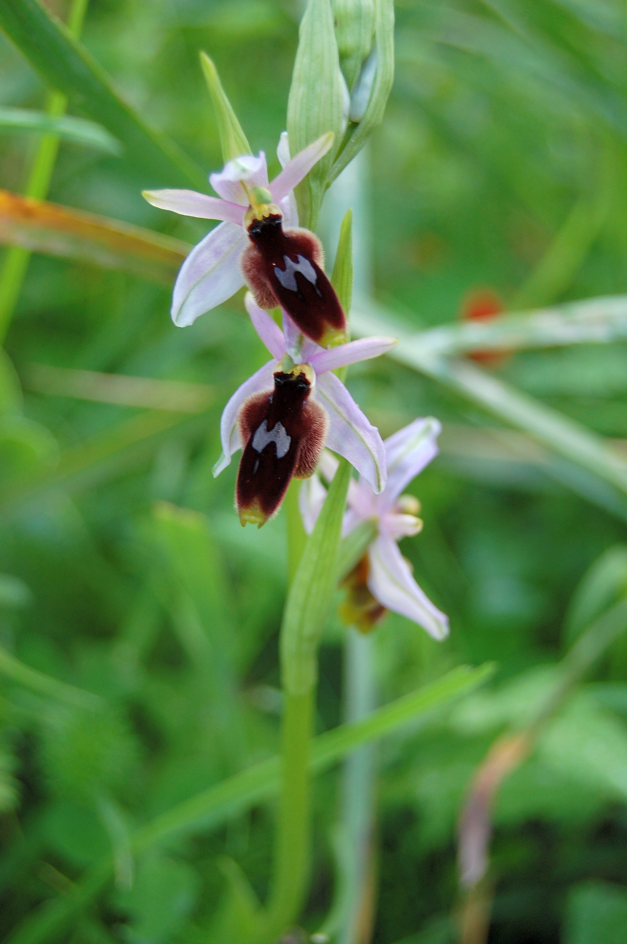 Orchidee dello Zingaro Ophrys lunulata